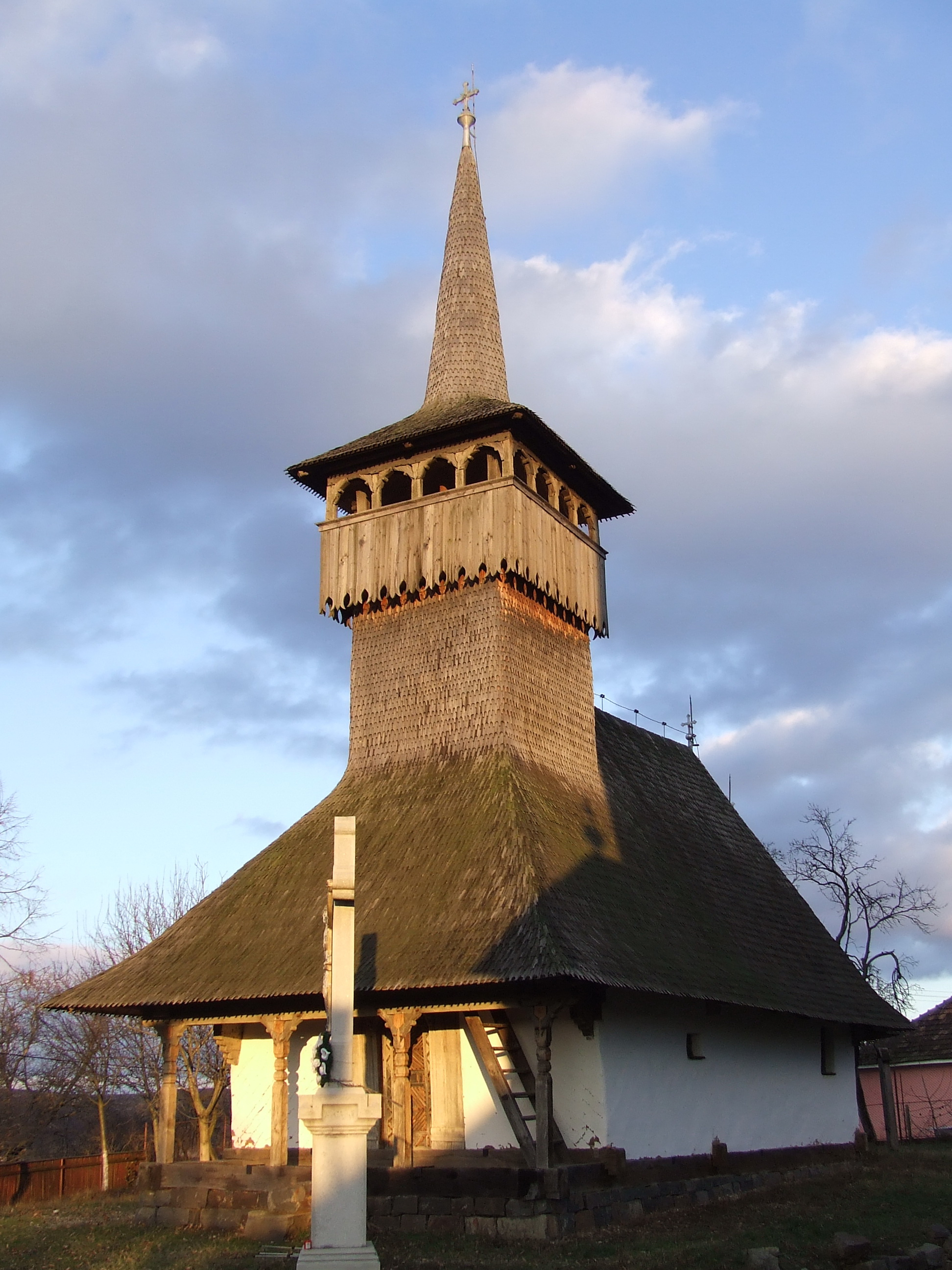 Biserica de lemn din Stâna, judeţul Satu Mare